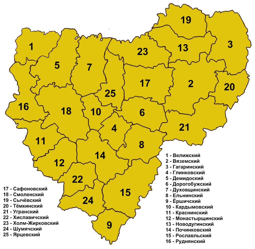 Карта районирования Смоленской области